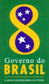 Logomarca dos 8 anos do governo Fernando Henrique Cardoso. Foi usada durante o ano de 2002 nos papéis de repartições do governo federal.